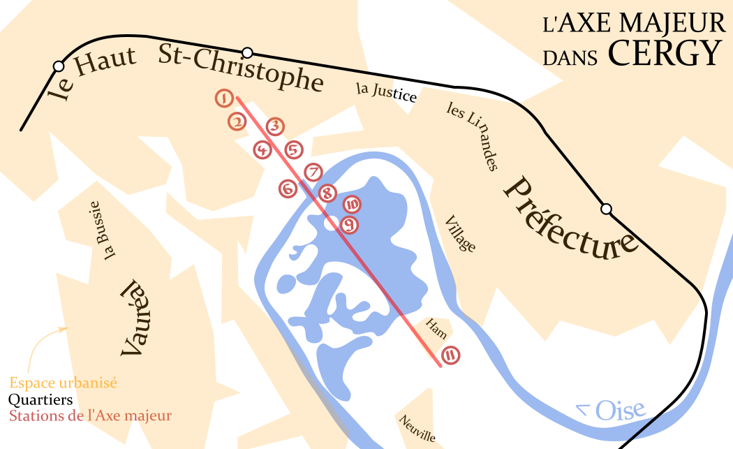 Carte de l'Axe majeur et des quartiers l'entourant, à Cergy-Pontoise.